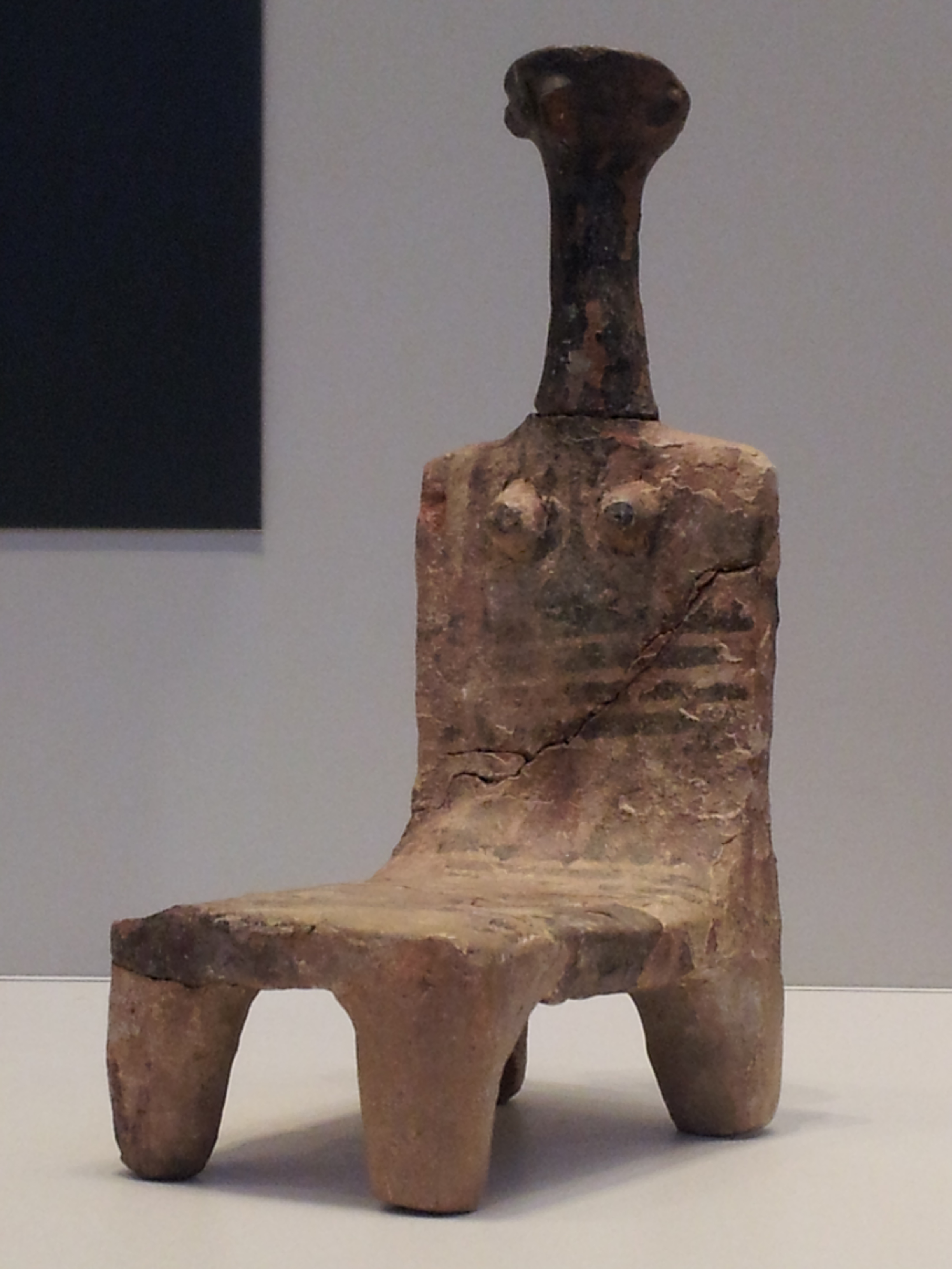 צלמית של אישה שזכתה לכינוי "אשדודה", על שם מקום מציאתה (תל אשדוד), שימשה למטרות פולחן. מוצגת במוזיאון ישראל בירושלים.